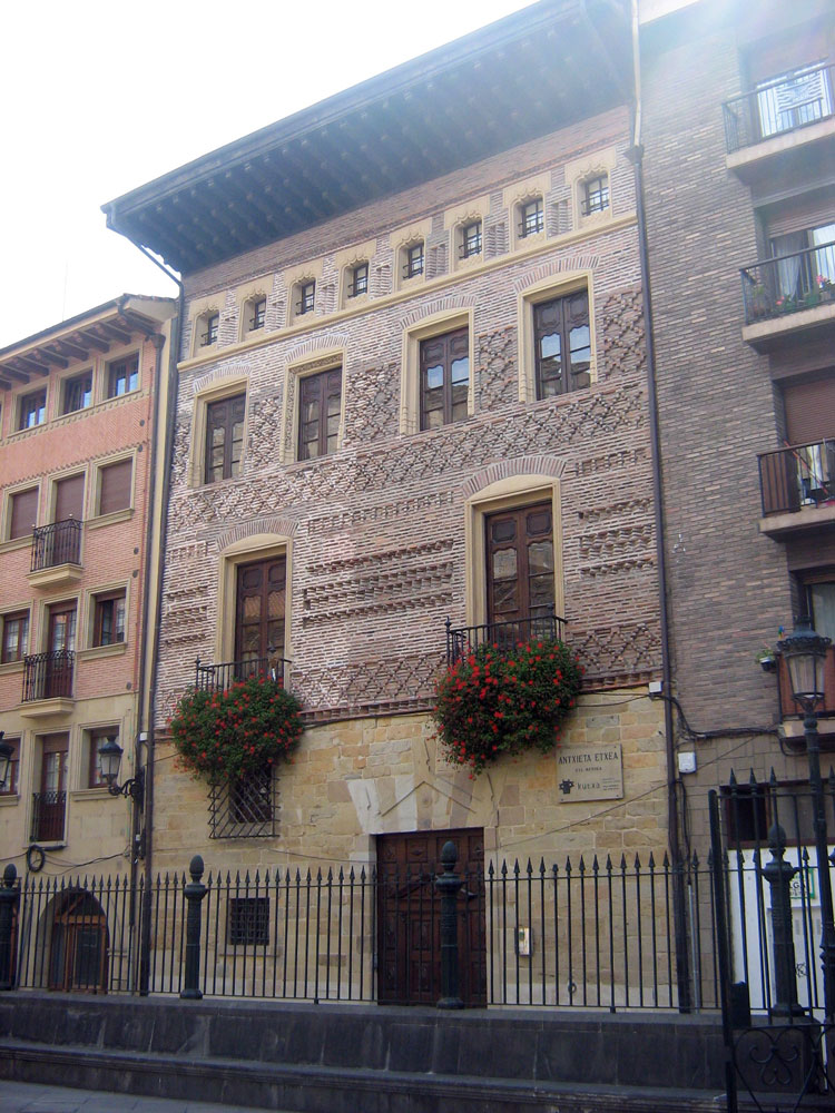 Palacio Antxieta, situado en el centro de la localidad vasca de Azpeitia.